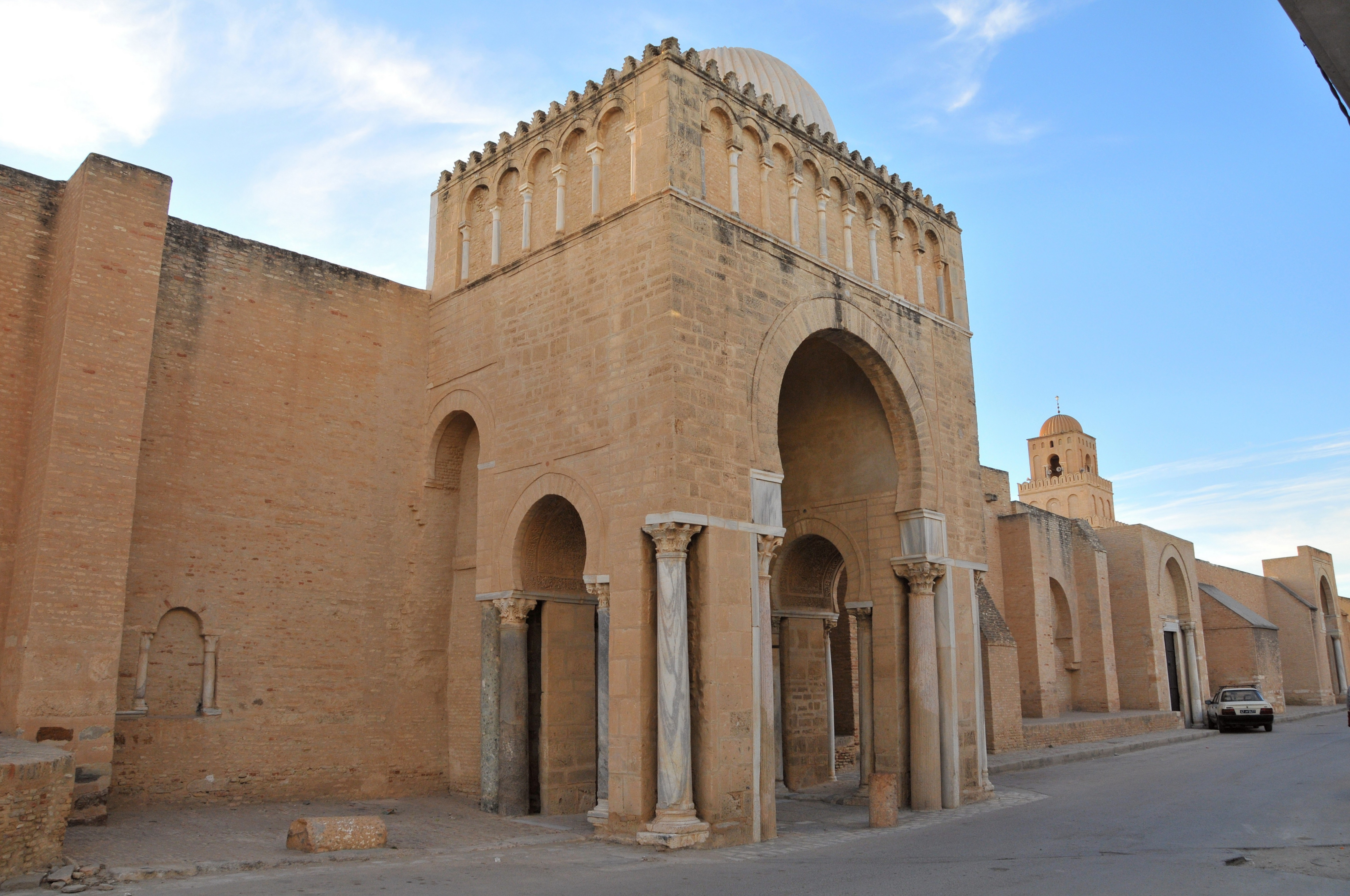 Vue du porche de Bab Lalla Rihana, côté oriental de l'enceinte de la Grande Mosquée de Kairouan, en Tunisie.